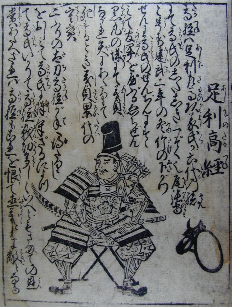 shibatakatune